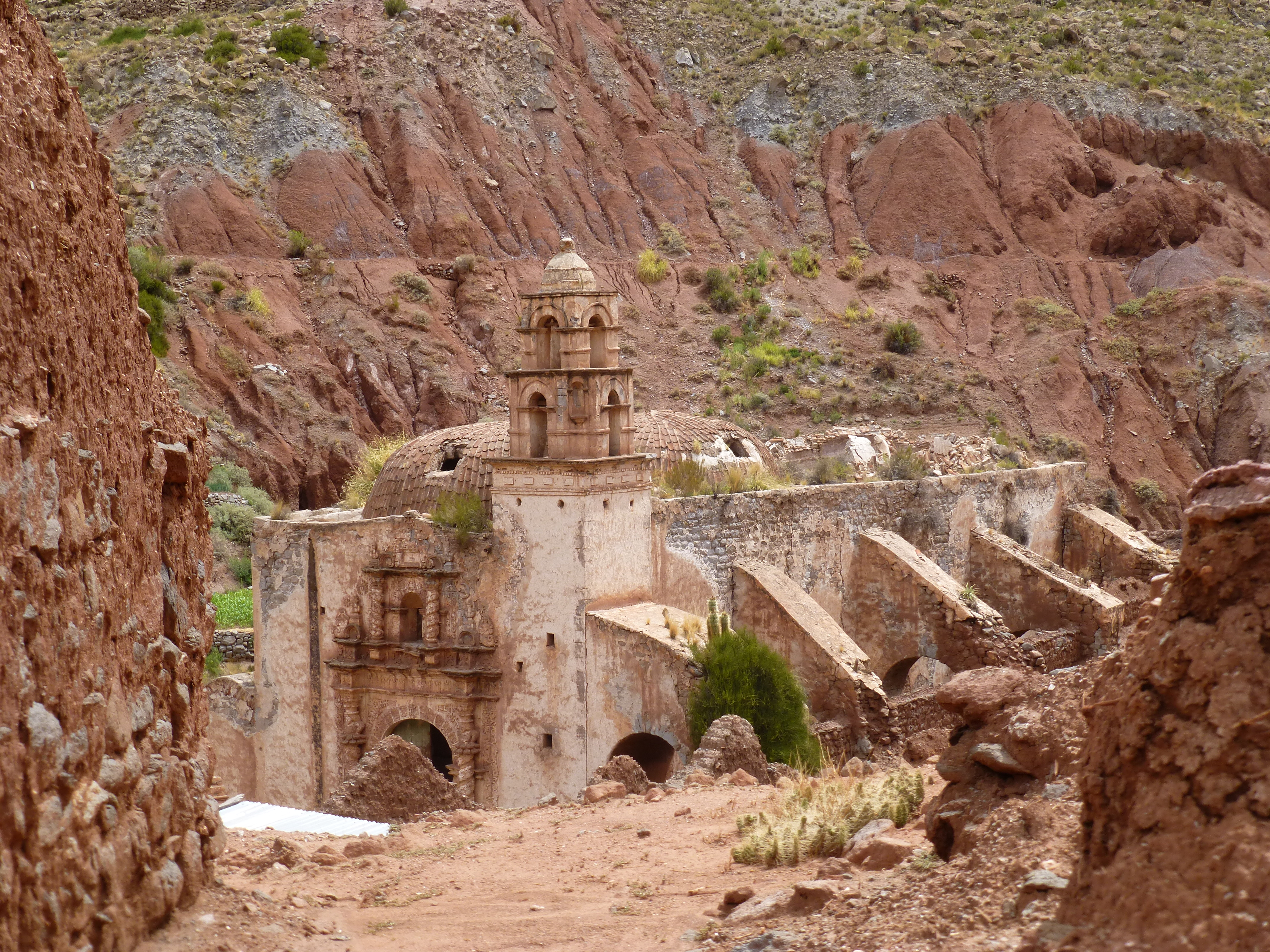 Templo de Salinas de Yocalla This medium shows the protected monument with the number P/00-074 in Bolivia.